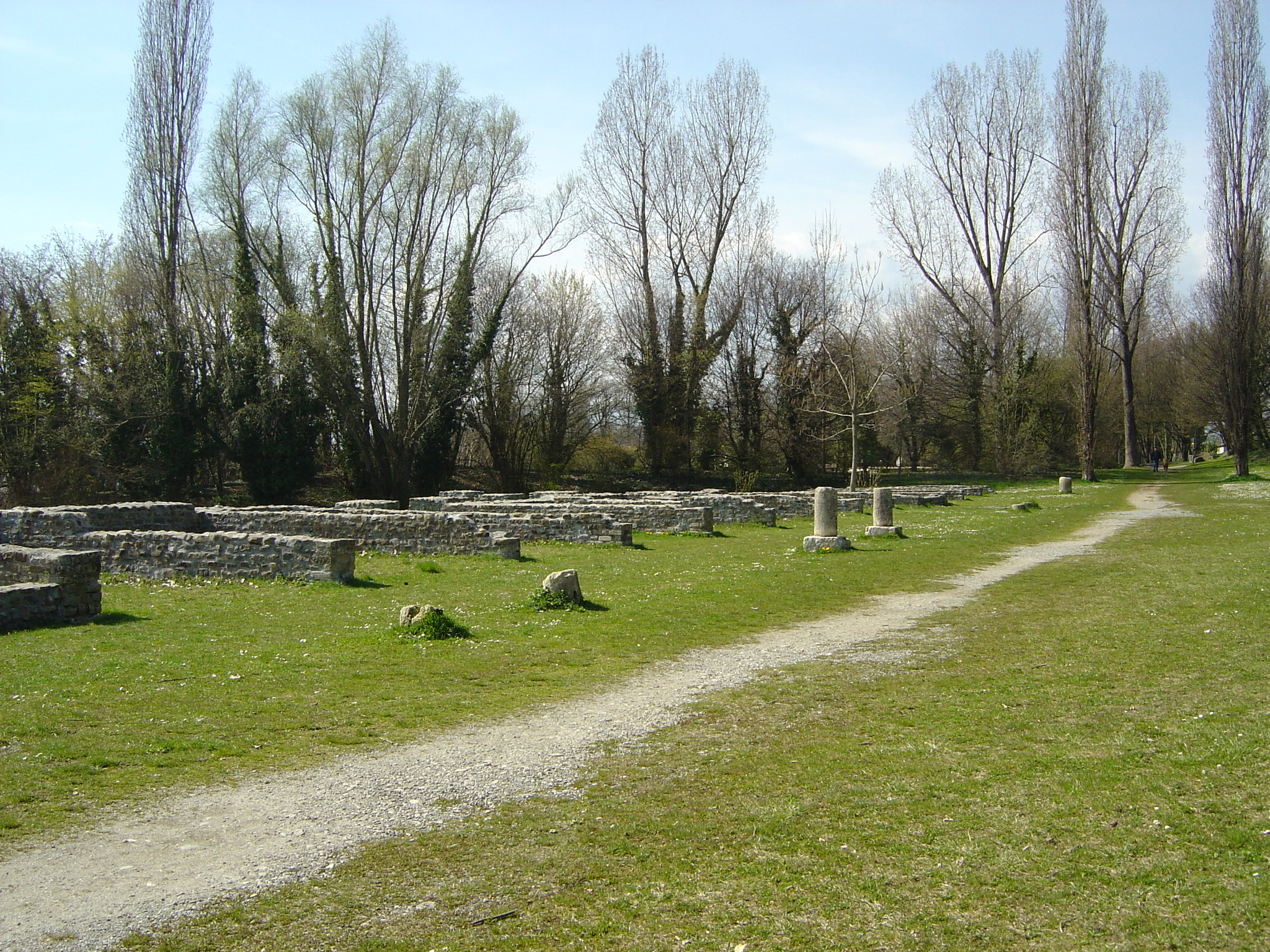 Vestiges archéologiques de Lousonna